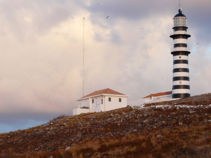 O farol